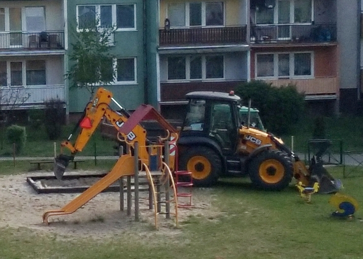 Tomaszów Mazowiecki w województwie łódzkim, PL, EU. Wymiana piasku w piaskownicy na osiedlu Hubala I, CC0